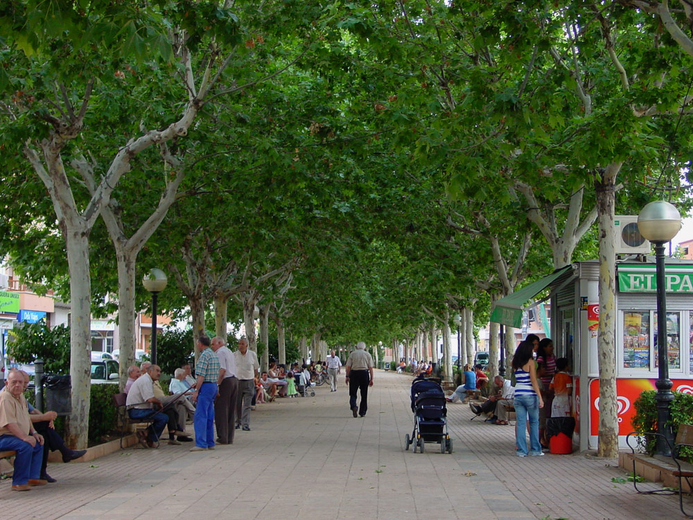 Avenida del Riato, en Motilla del Palancar (Cuenca, España)